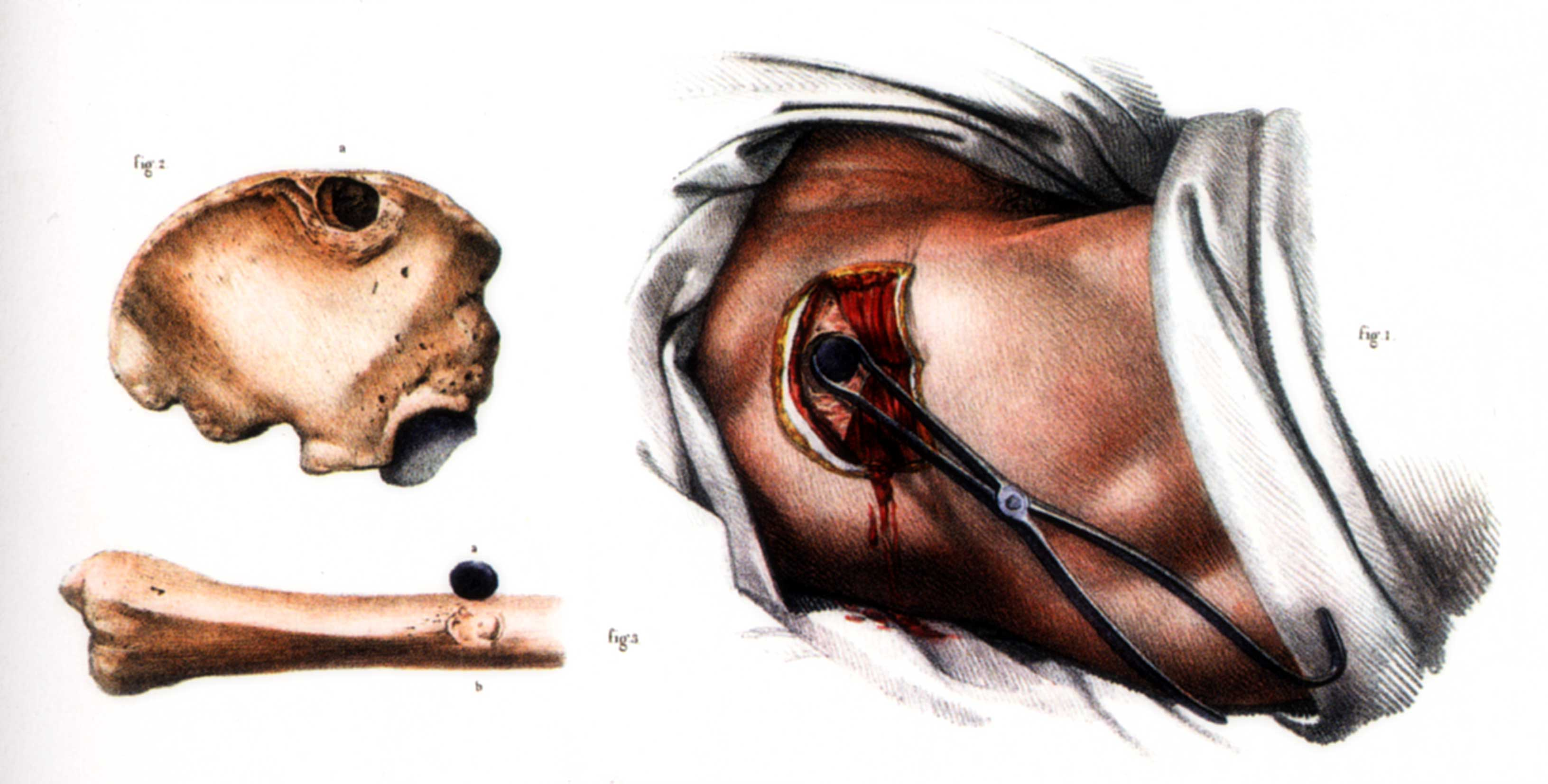 Chirurgische Entfernung (lat. Extractio) einer Gewehrkugel an der Außenseite (lat. Facies glutaea) der rechten Darmbeinschaufel (lat. Ala ossis ilii) in Höhe des Beckenkamms (lat. Crista iliaca) (rechts, Fig 1), Kugel-Impression an der Außenseite des präparierten rechten Darmbeins (Darmbeinschaufel in Höhe des Beckenkamms) (links oben, Fig 2) und der Vorderseite des präparierten linken Schienbeins (lat. Tibia) in Höhe des Schafts (lat. Corpus tibiae), am Vorderrand (lat. Margo anterior) (links unten, Fig 3)